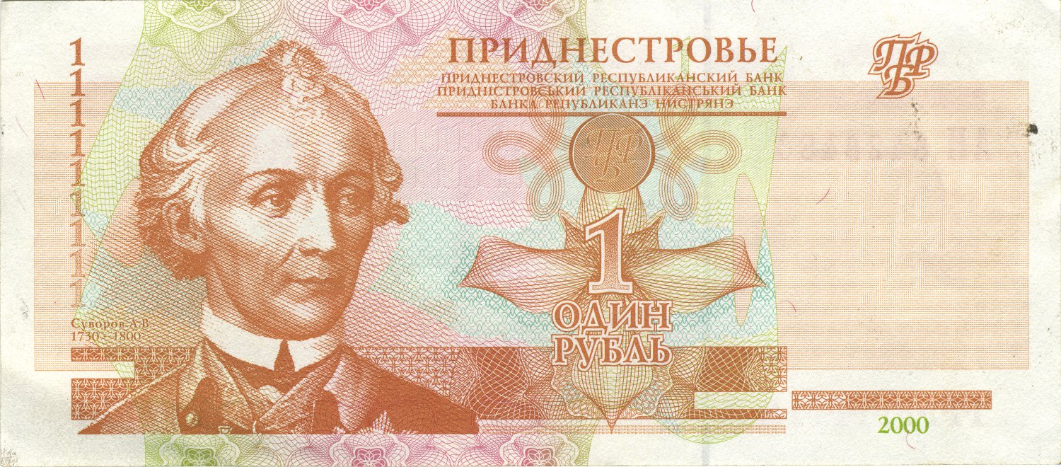 1 Transnistrian ruble (obverse)